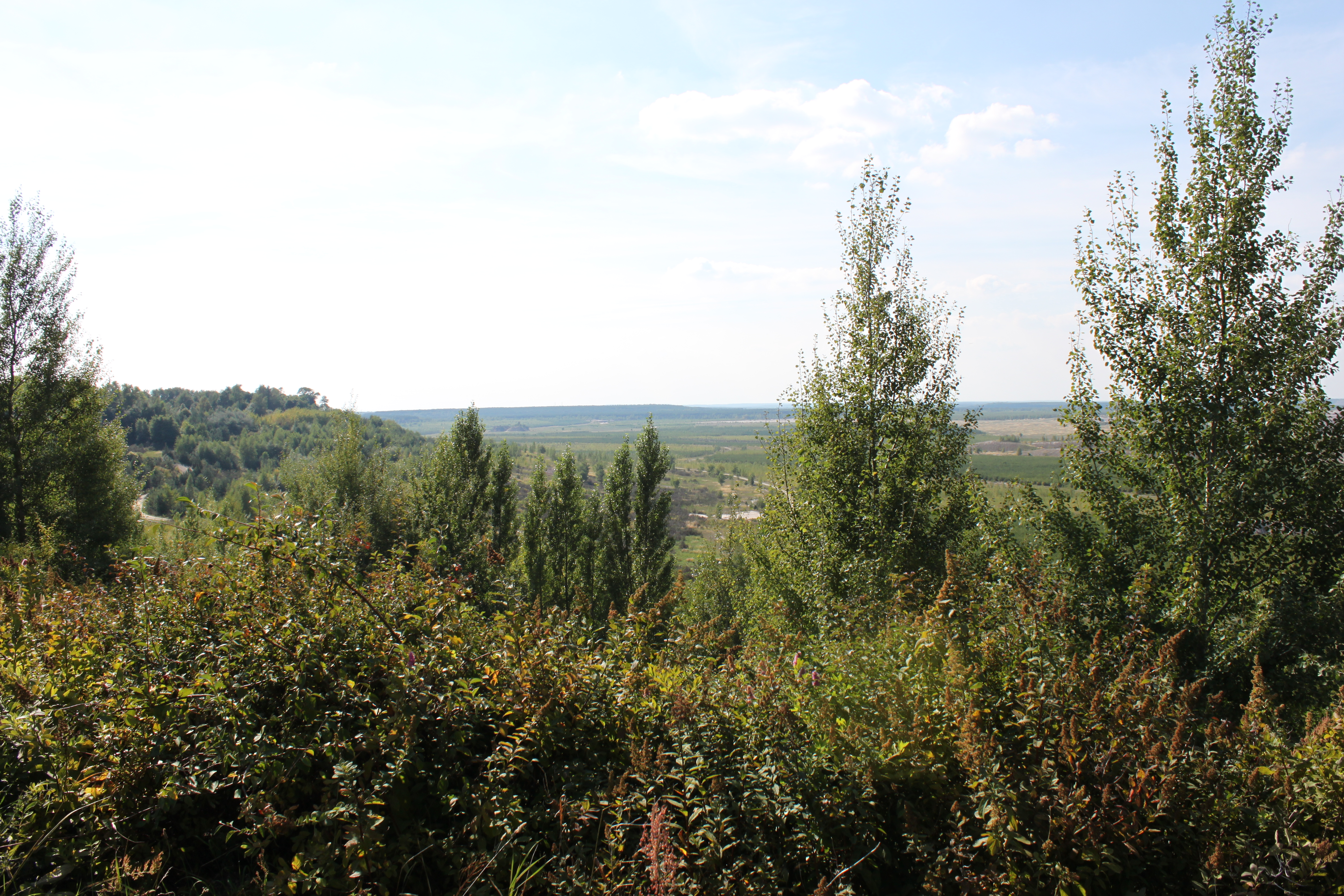 Kostebrau